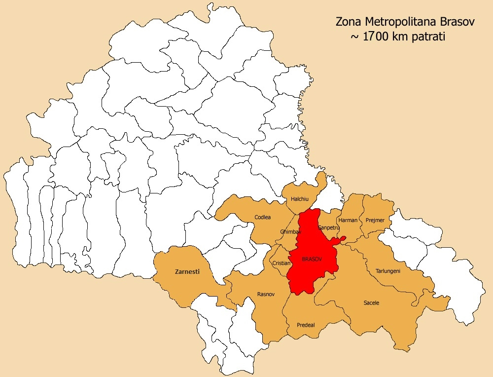 Zona metropolitana a municipiului Brasov